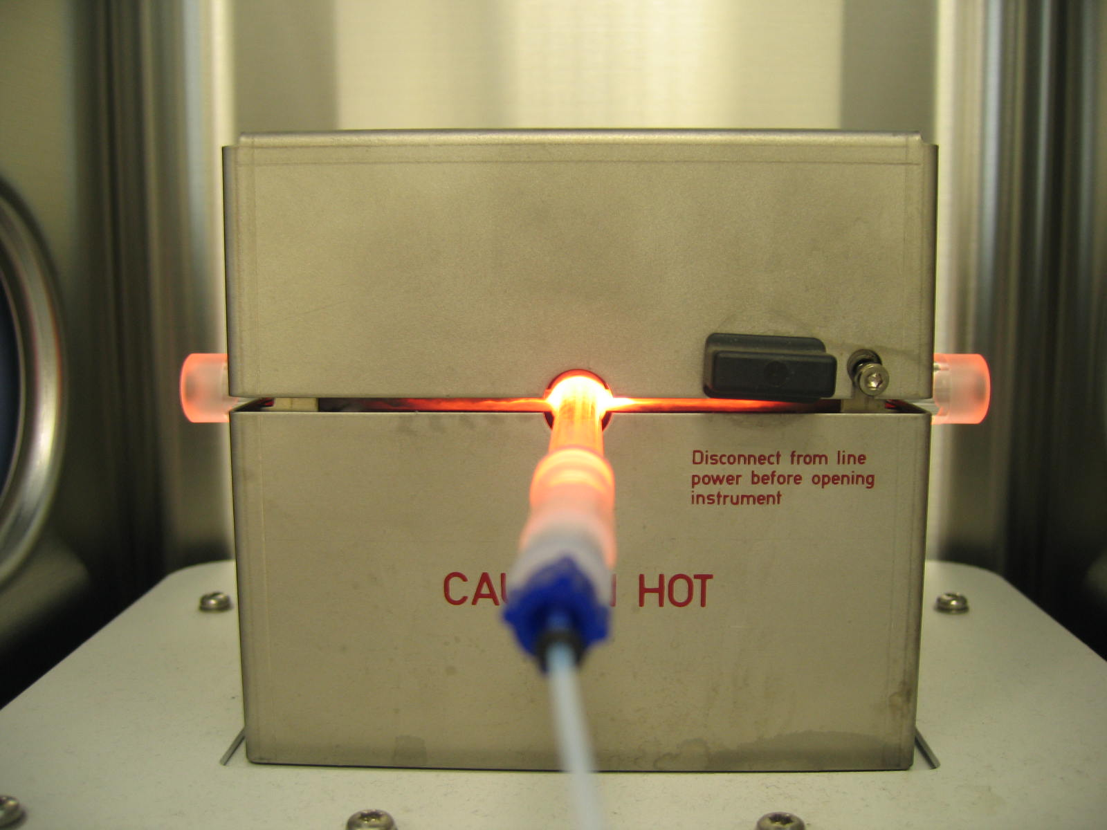 Das Bild zeigt eine Quarzzelle, elektrisch beheizt bei 1000 °C. Hydride werden in der Zelle in einer Oberflächenreaktion zersetzt.